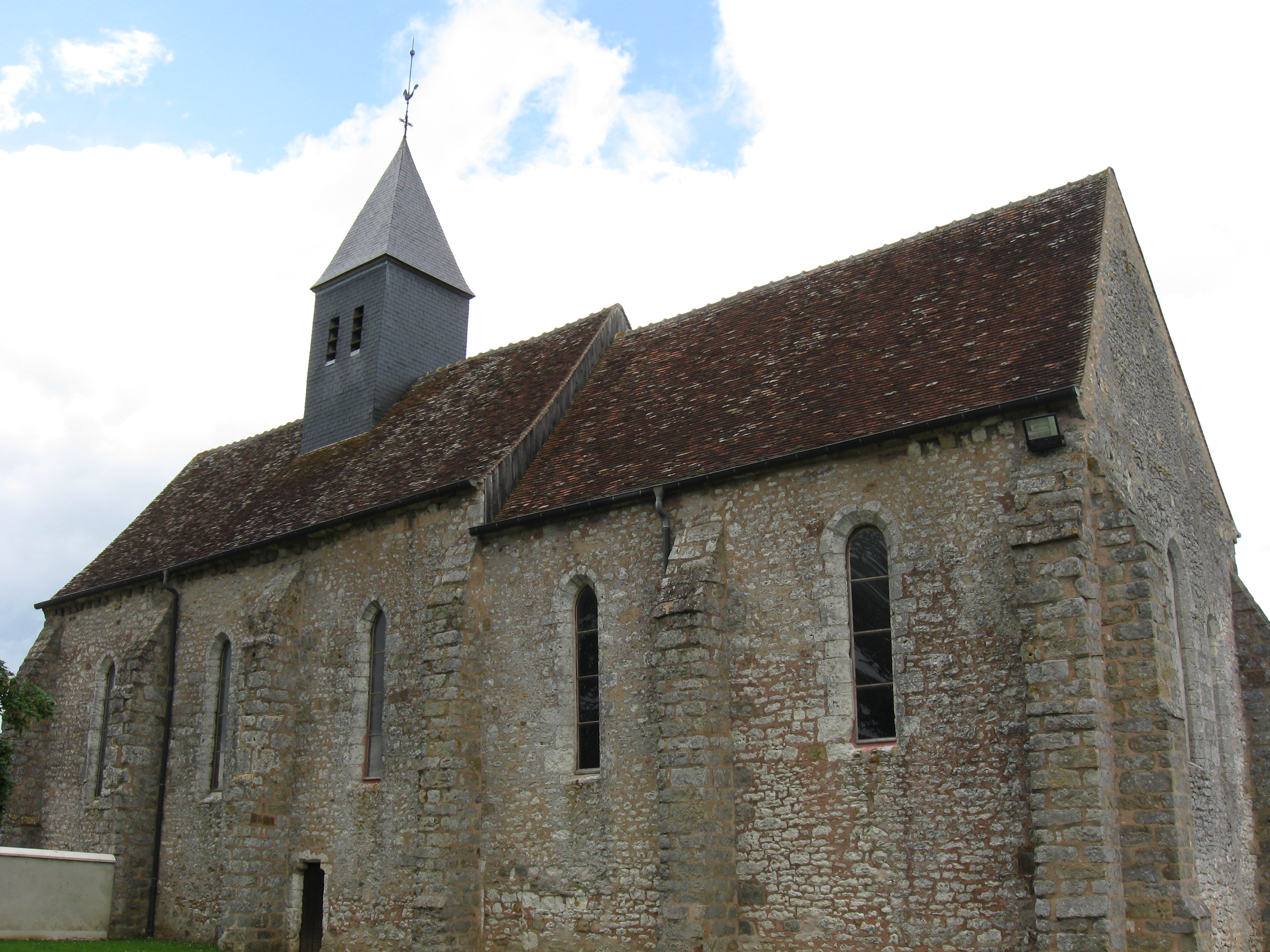 Église Saint-Gilles-et-Saint-Loup de Boisdon. (Seine-et-Marne, région Île-de-France).